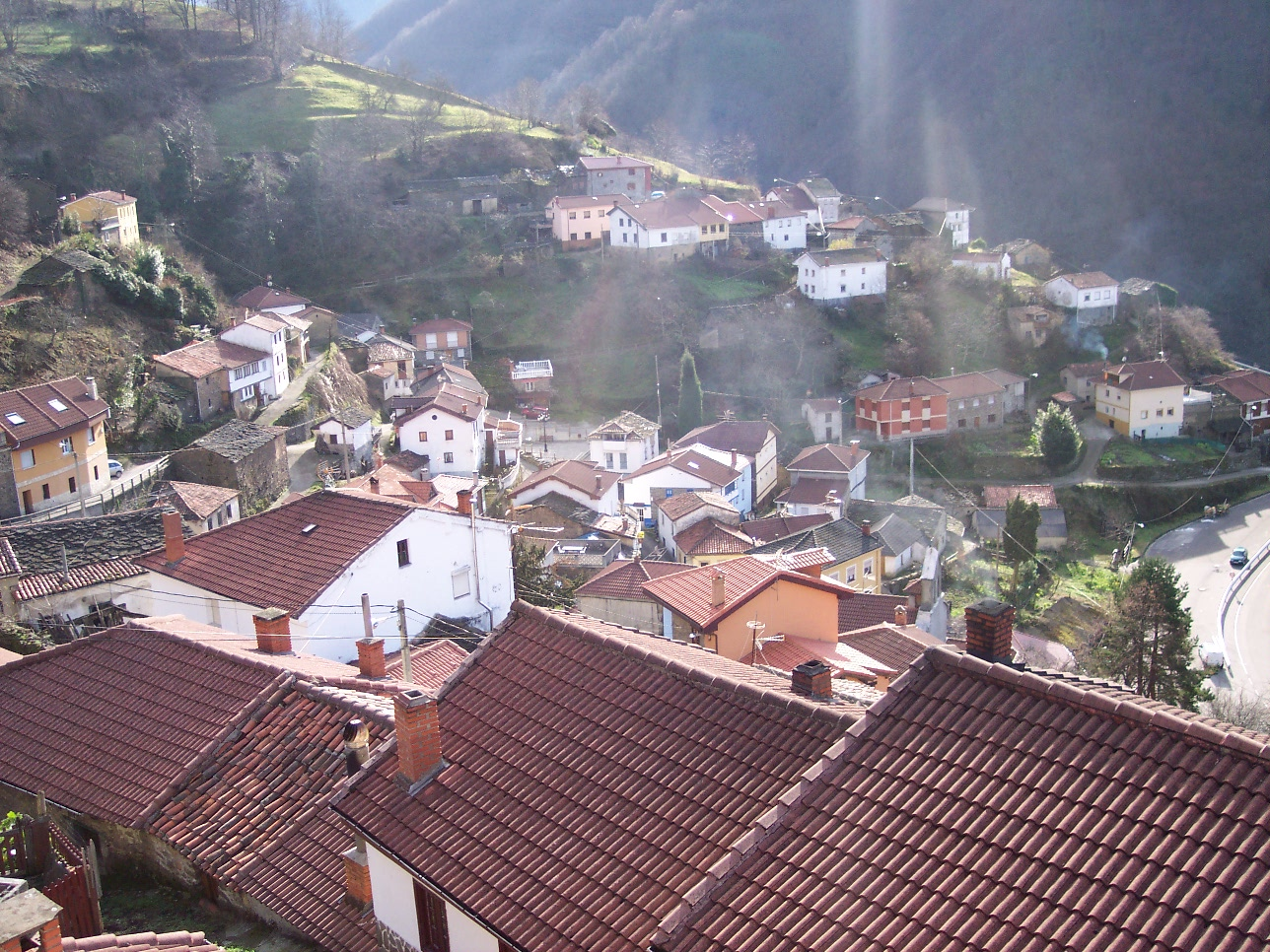 Vista de Murias, concejo de Aller (Asturias).